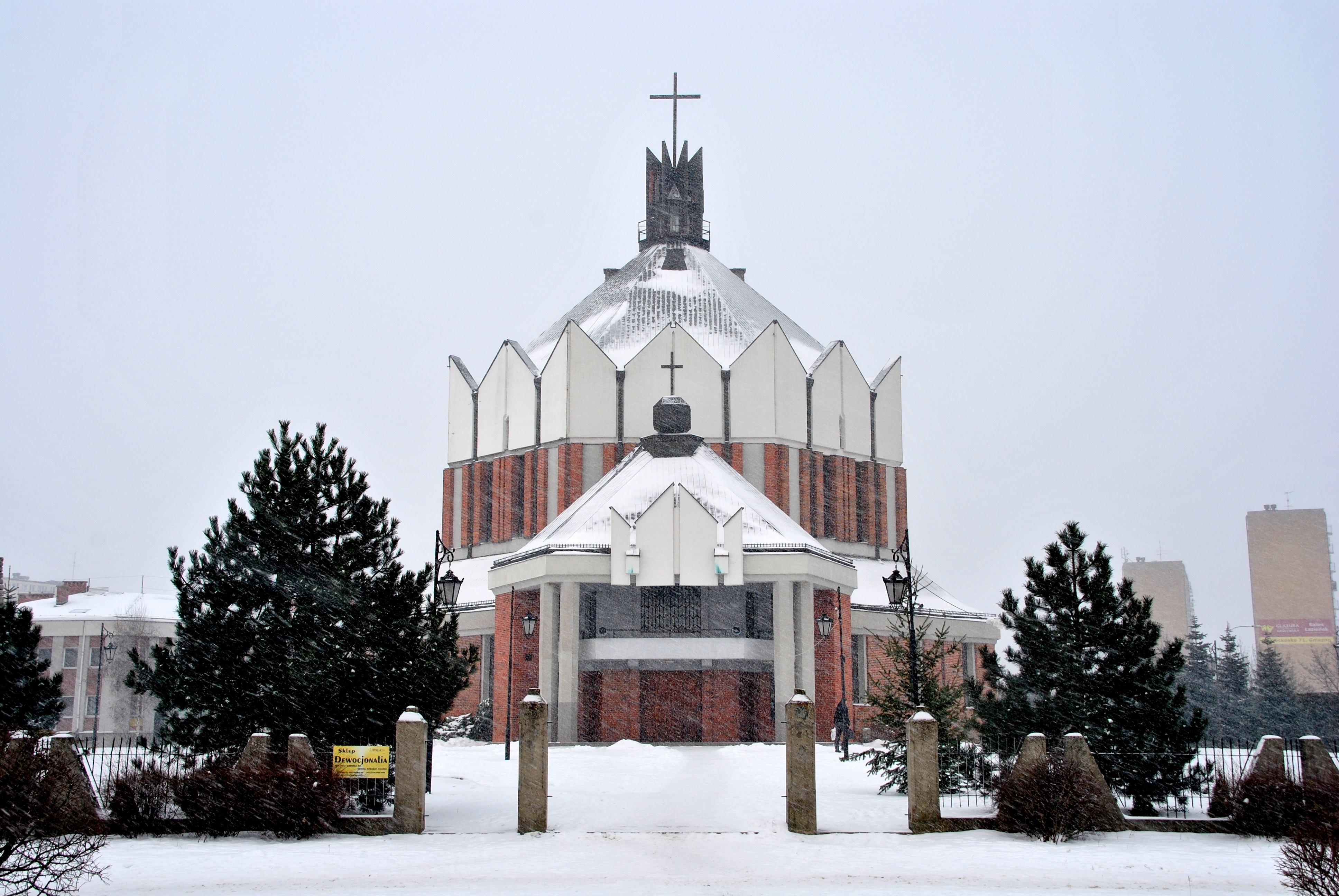 swiatyna_Radzyma